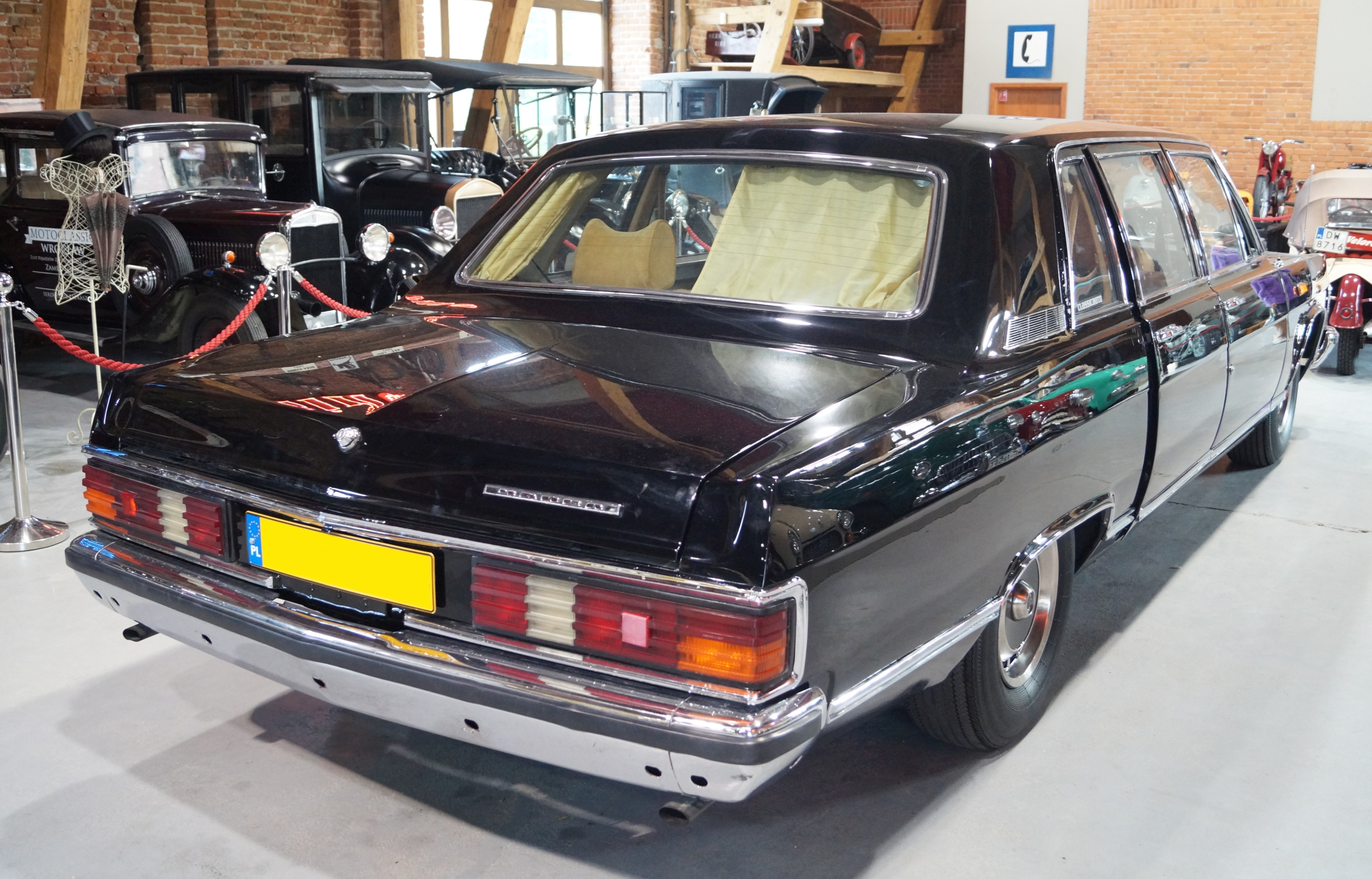 This photo was taken during Automotive Wikiexpedition 2016 set up by Wikimedia Polska Association. You can see all photographs in category Wikiekspedycja motoryzacyjna 2016. English | Polski | +/− GAZ-14 Czajka w Muzeum Motoryzacji Topacz w Ślęzie